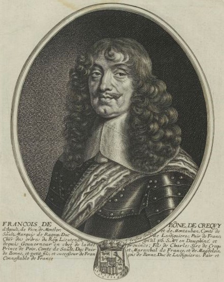 estampe : François de Bonne de Créqui, 3e duc de Lesdiguières, mort en 1677.